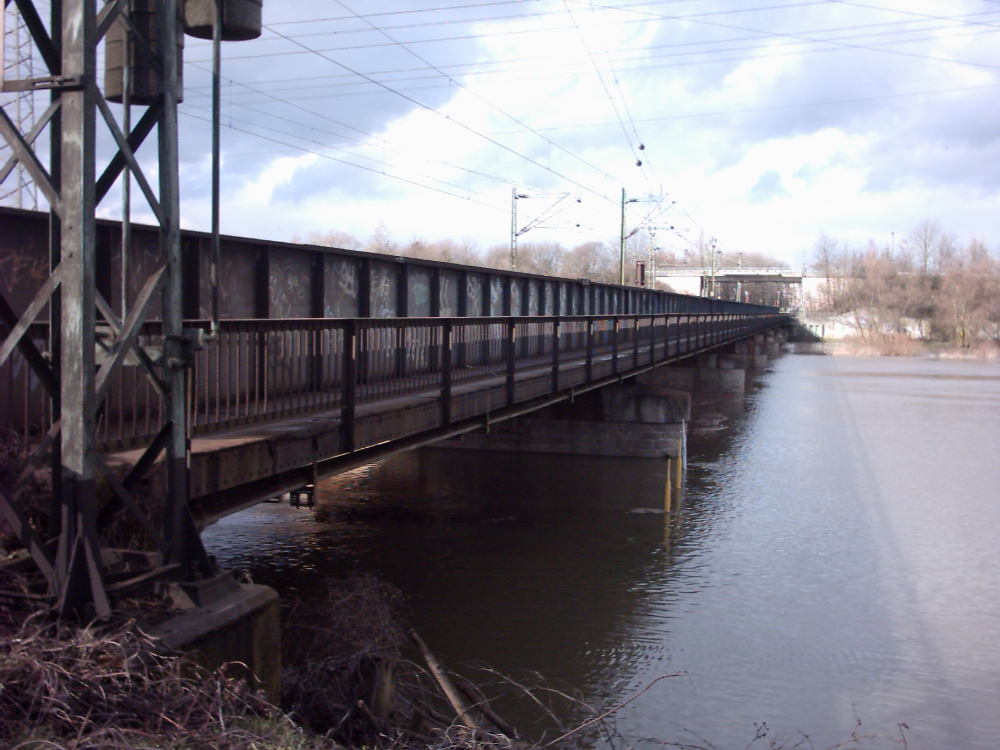 Bildbeschreibung: Eisenbahnbrücke zwischen Sankt Augustin-Menden und Troisdorf-Friedrich-Wilhelms-Hütte bei Hochwasser Quelle: selbst fotografiert Datum: 10.03.2006 Lizenz: GNU FDL